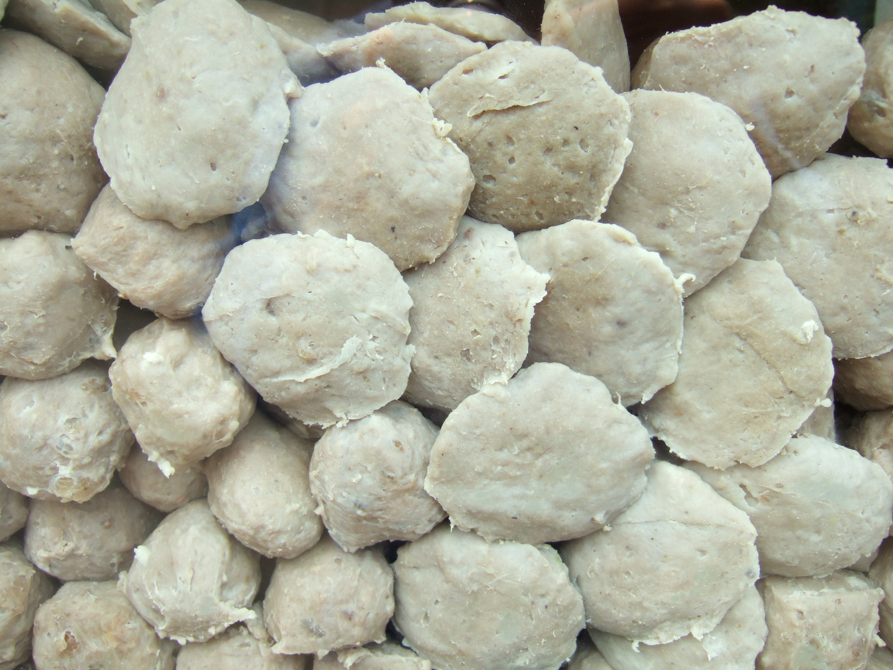 Bakso (meatballs). 屋台のおじさんが売る牛肉団子。